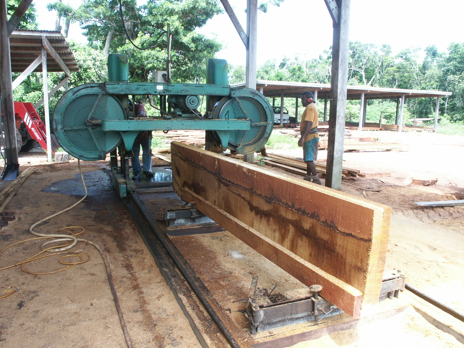 Sciage du bois de Kohu ; il s'agit d'une entreprise mélanésienne de l'île des Pins - Nouvelle-Calédonie.